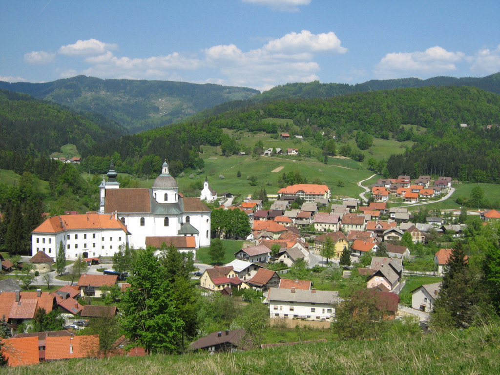 Gornji Grad in Gornji Grad municipality, Slovenia